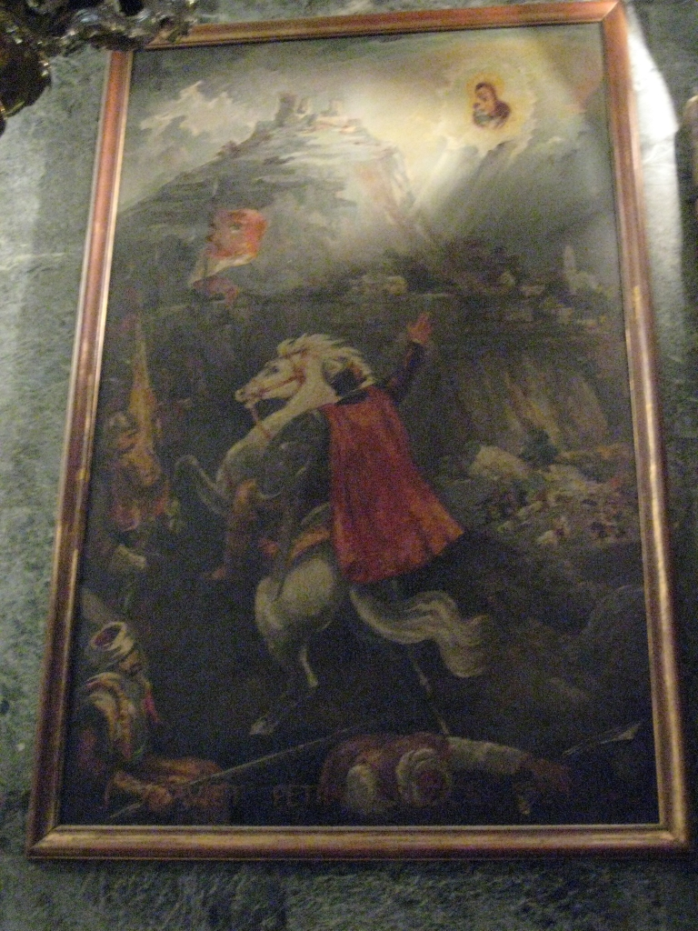 Slika Petra Kružića koji je 1531. g. sagradio grobnu kapelu sv. Petra u crkvi Gospe Trsatske, Rijeka. Croatia